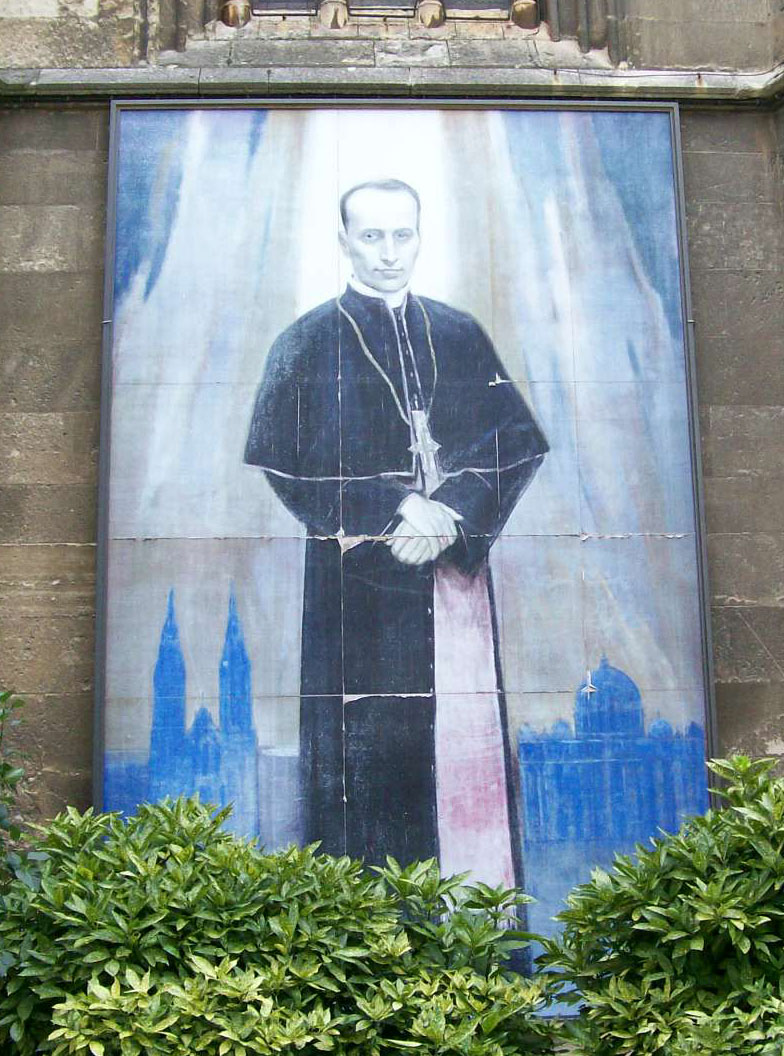 Alojzije Stepinac, slika iz Zagrebačke katedrale